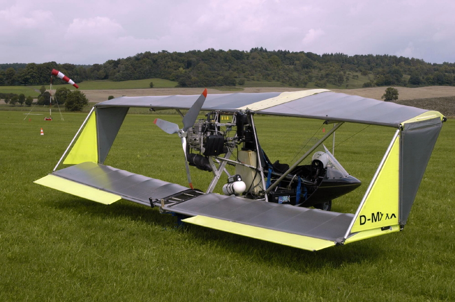 Ultraleichtflugzeug Sunny Sport